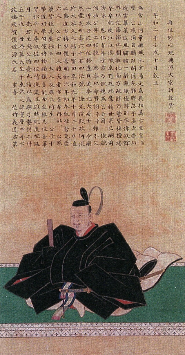 蜂須賀重喜の肖像。